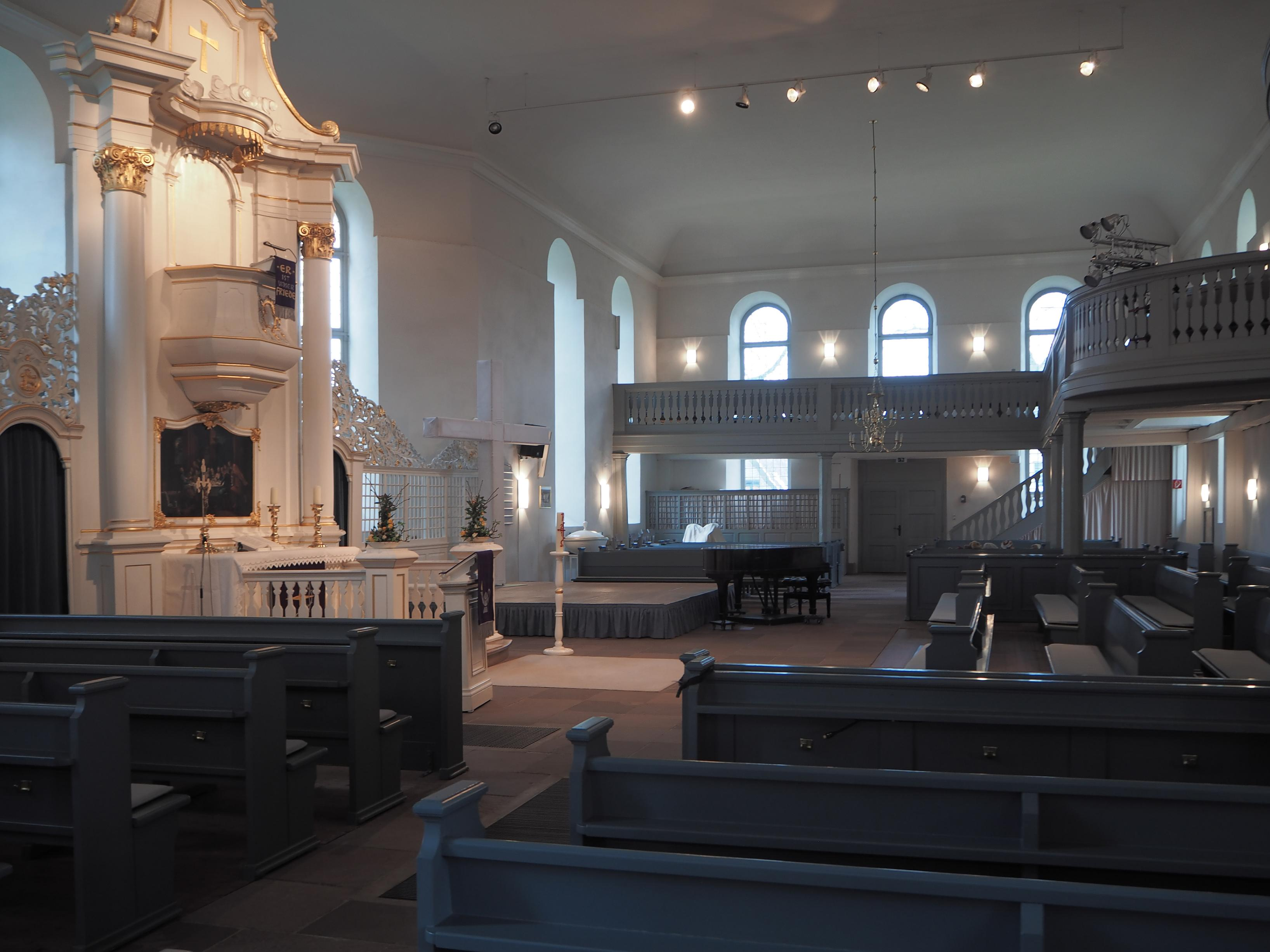 Harpstedt (Niedersachsen) - Christuskirche - Inneners (Querhaus